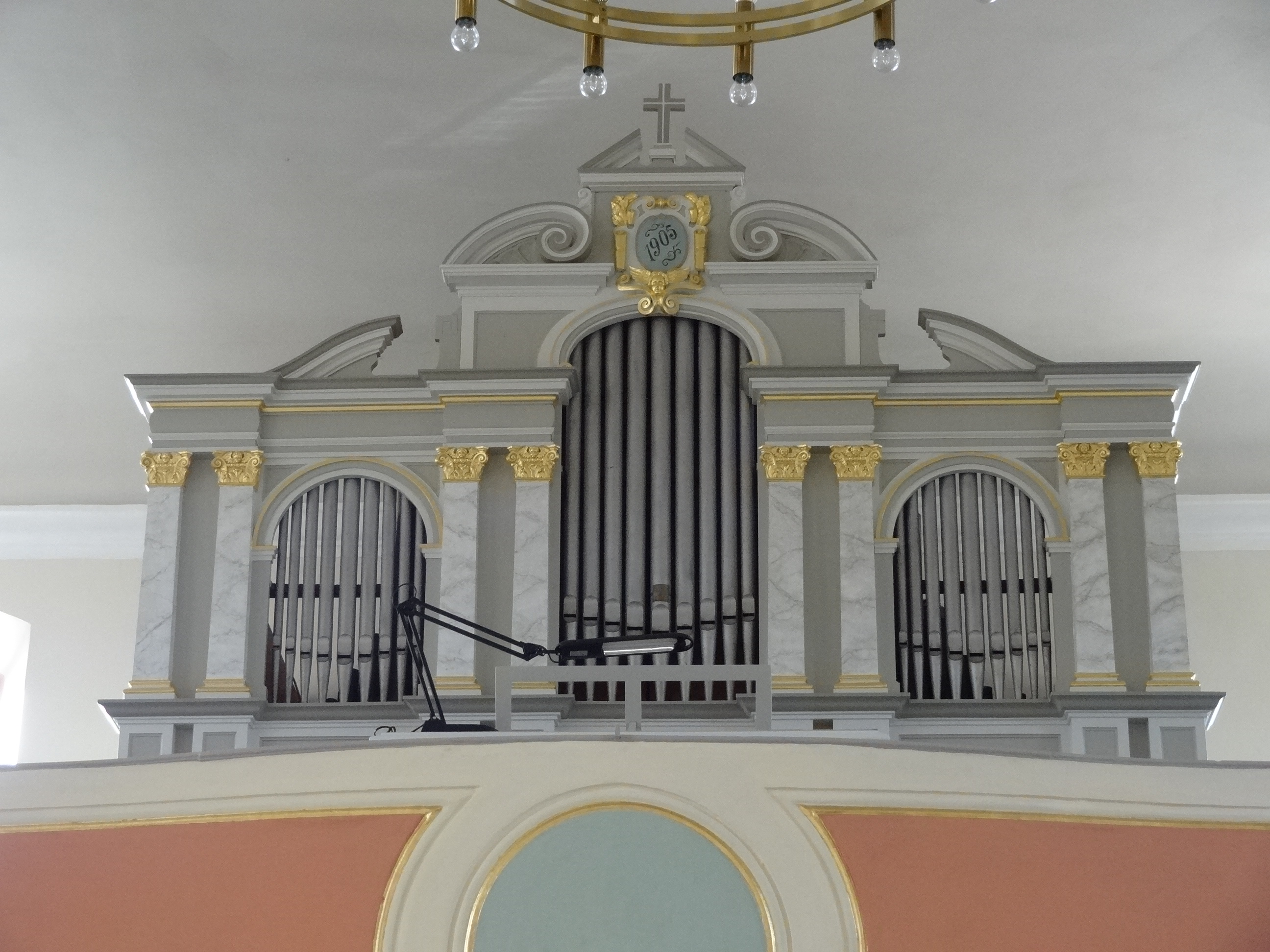 Evangelische Kirche Rodheim (Hungen)